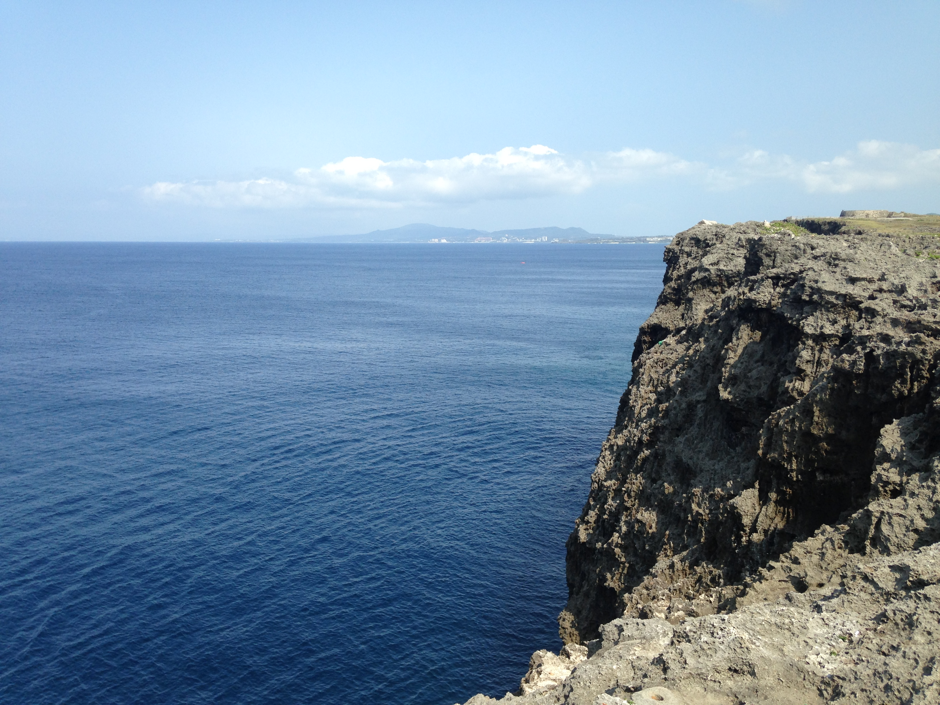 残波岬の崖。恩納村の西海岸が遠く見える。